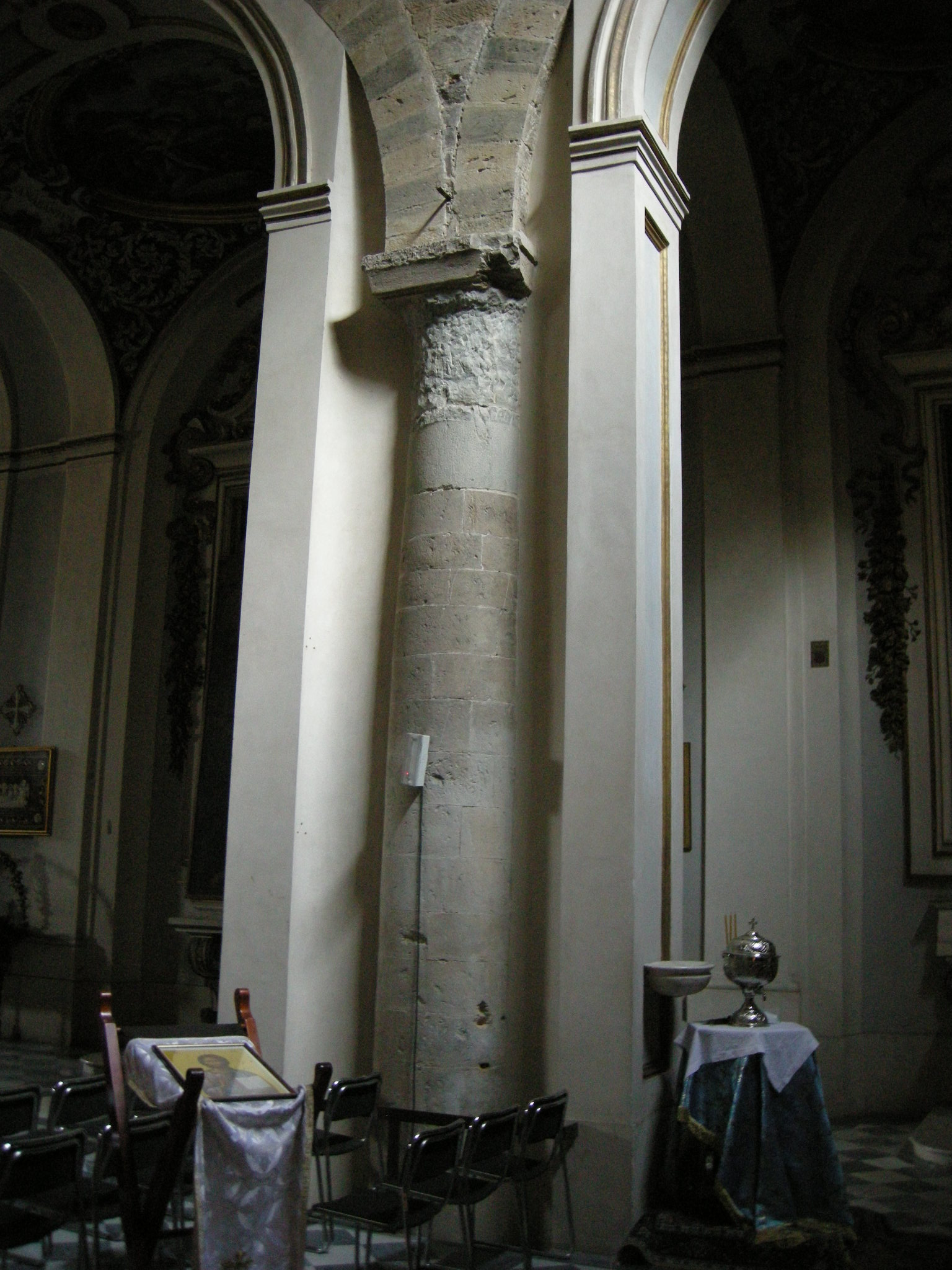 San Jacopo Soprarno, interno, colonna incassata